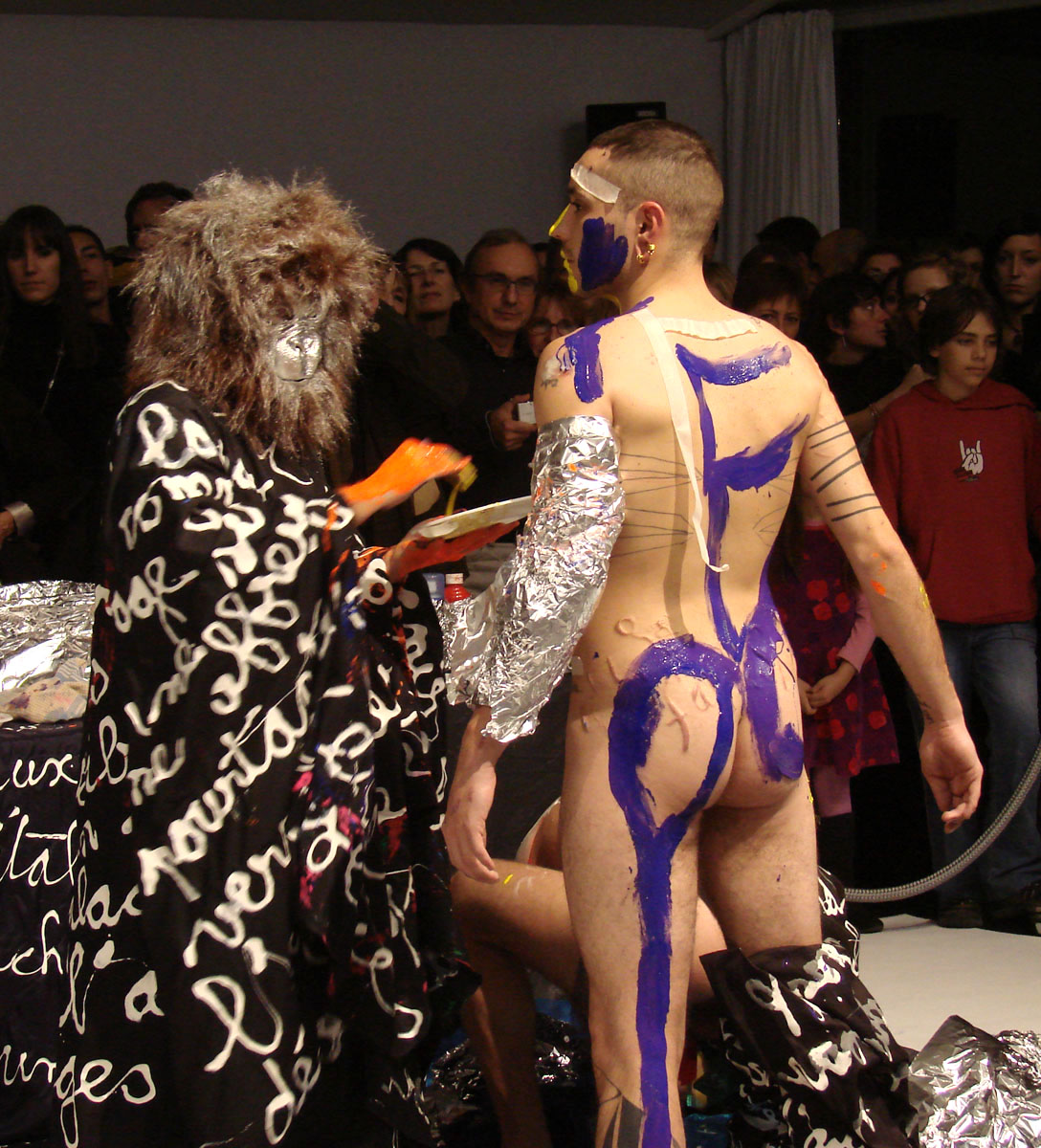 Performance de "bodypainting" de Karl Lakolak, plasticien et écrivain (à gauche) avec JON, performeur (à droite). "Quand les couleurs habillent le corps", une exposition du CNRS au Trocadéro à Paris